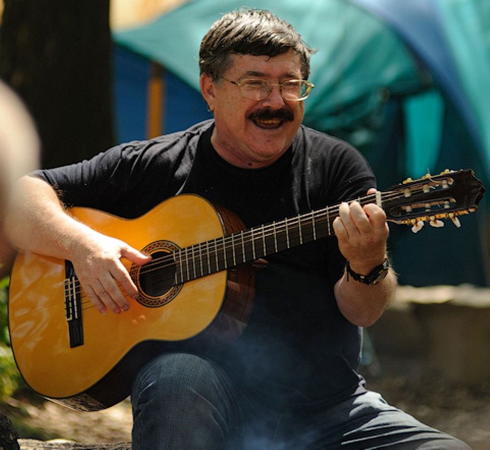 Борис Бурда, фестиваль авторской песни "Платформа" 2012